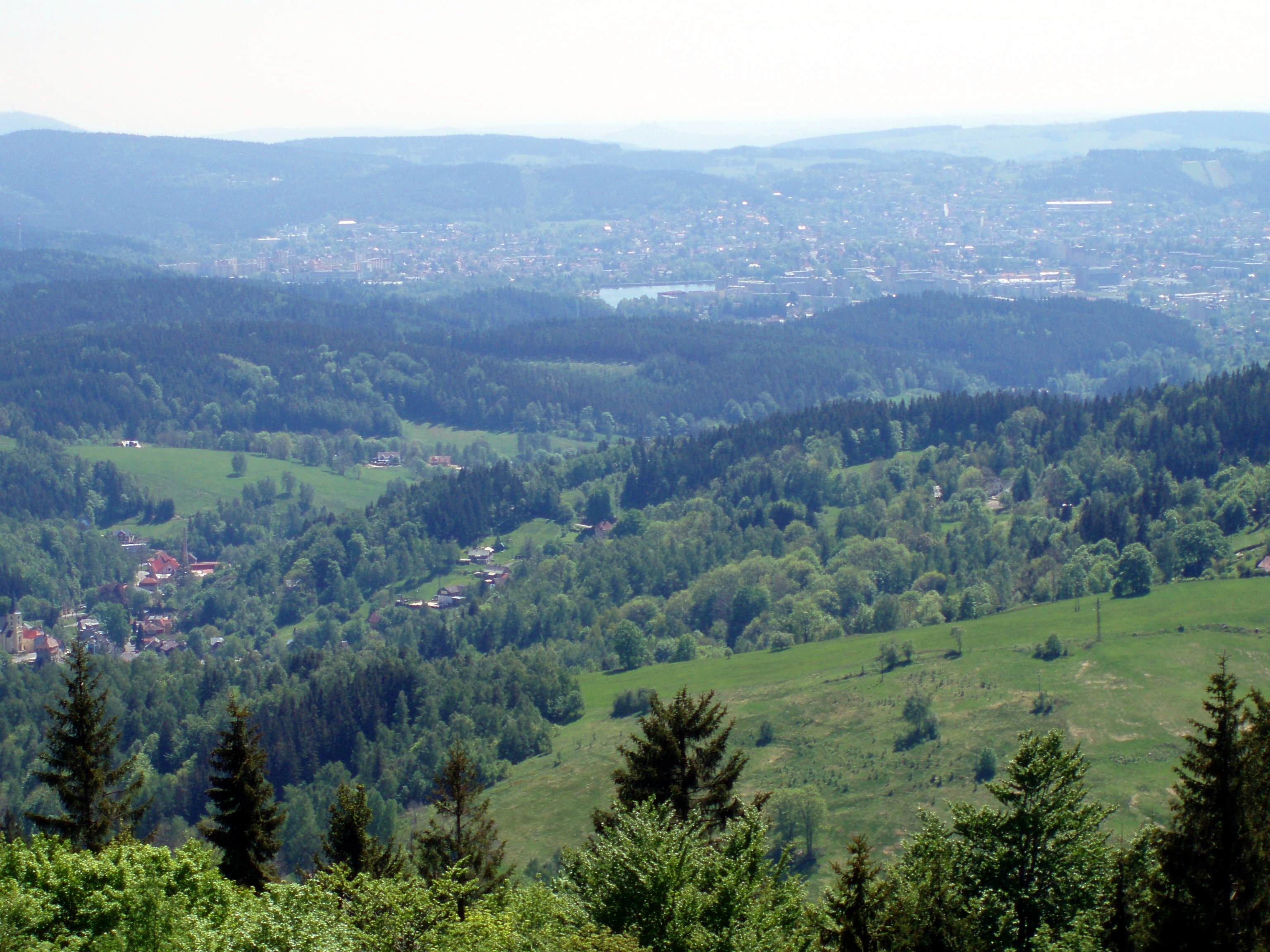 Blick von der Königshöhe auf Gablonz